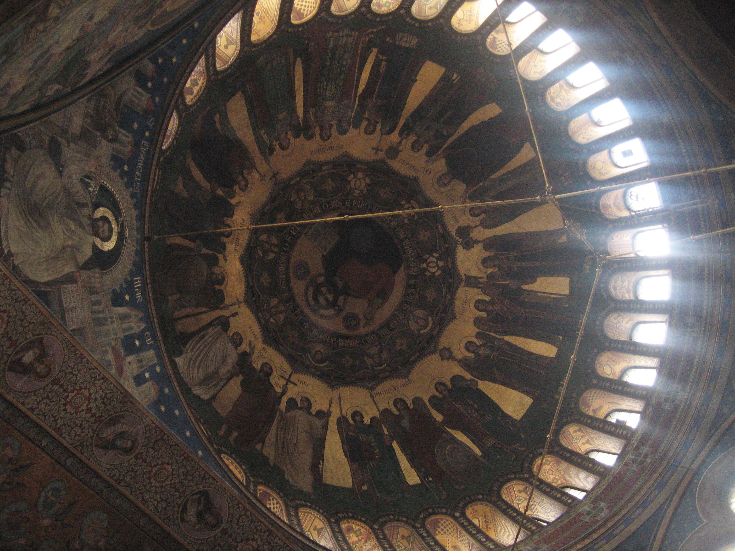 Catedrala mitropolitana din Sibiu